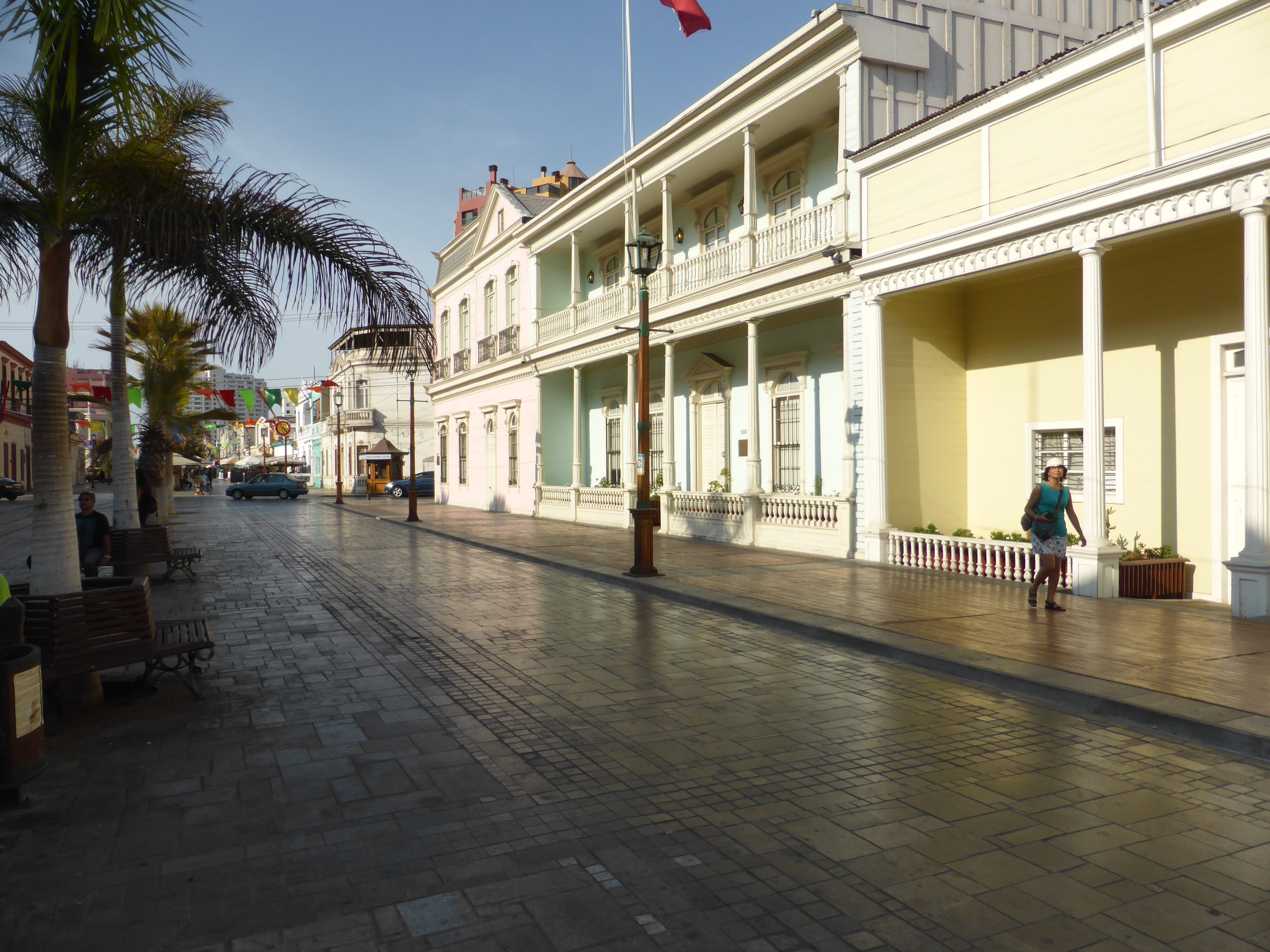 La calle o paseo Baquedano, junto con la plaza Arturo Prat, se consideran Monumentos nacionales de la Región de Tarapacá.